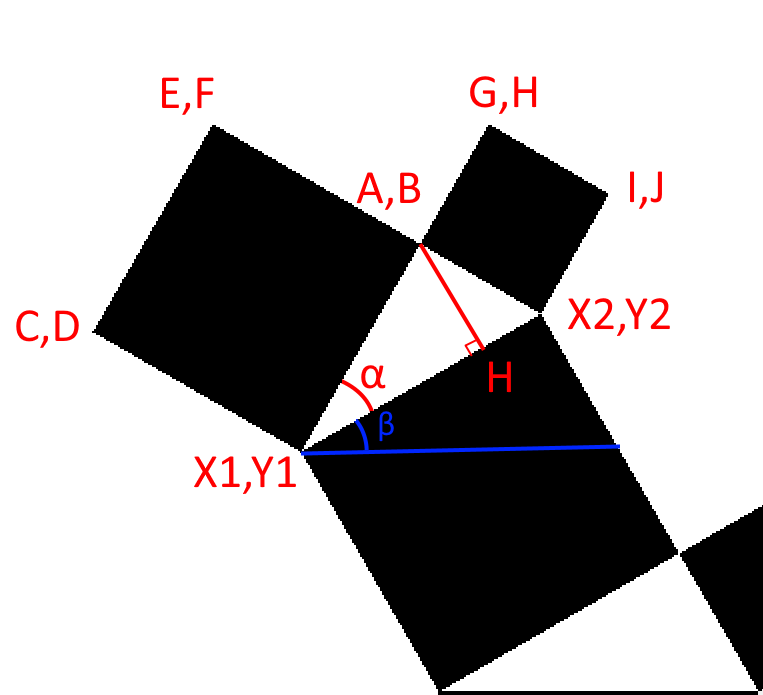 erg